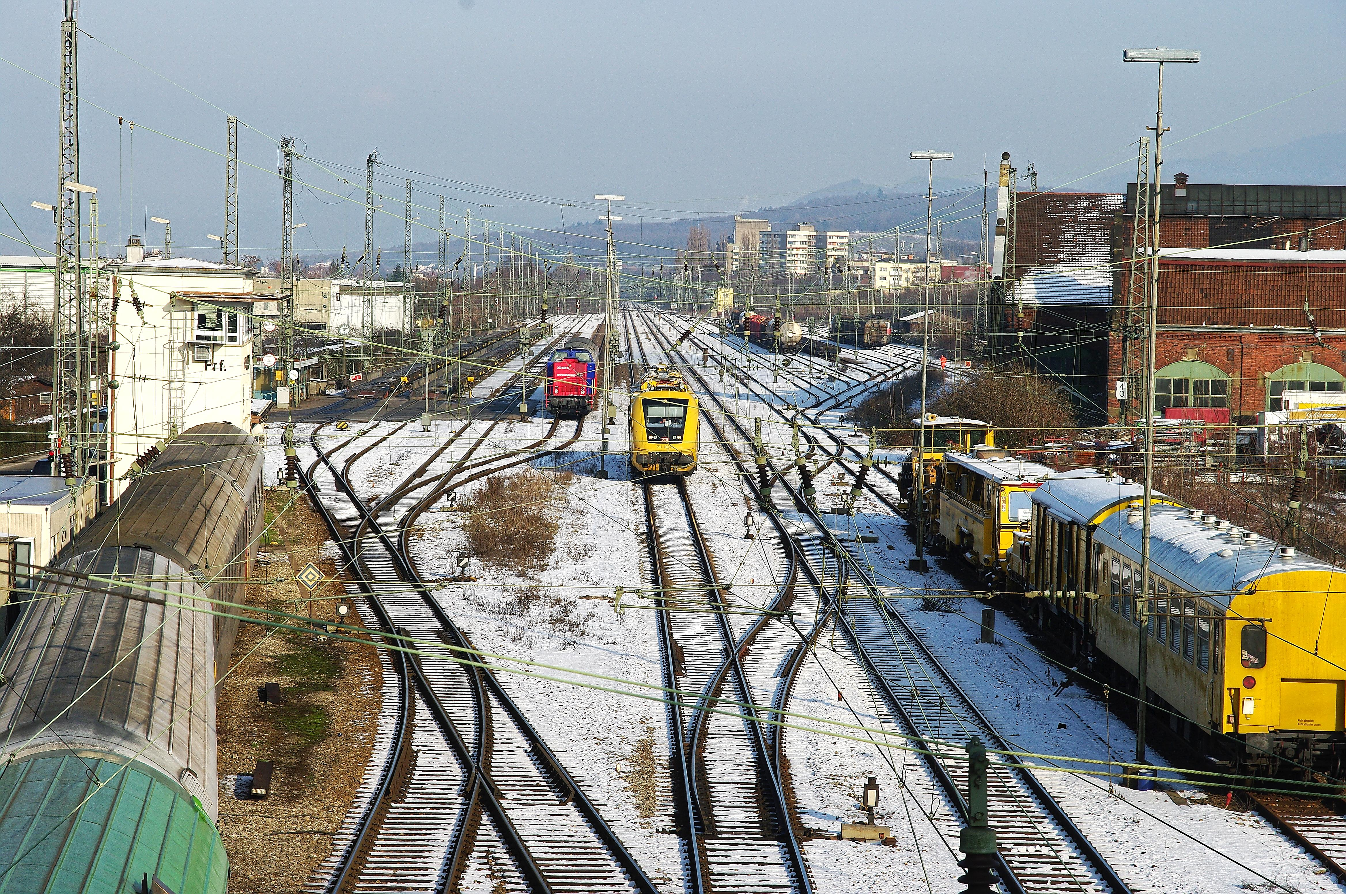 Güterbahnhof Freiburg im Breisgau